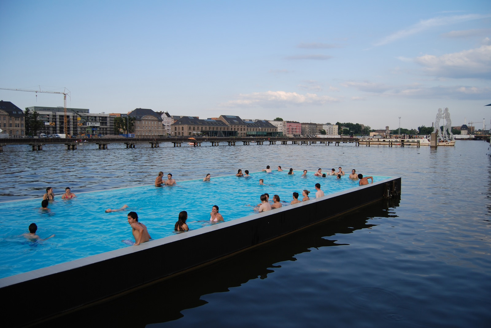 Das Badeschiff Berlin auf der Spree.